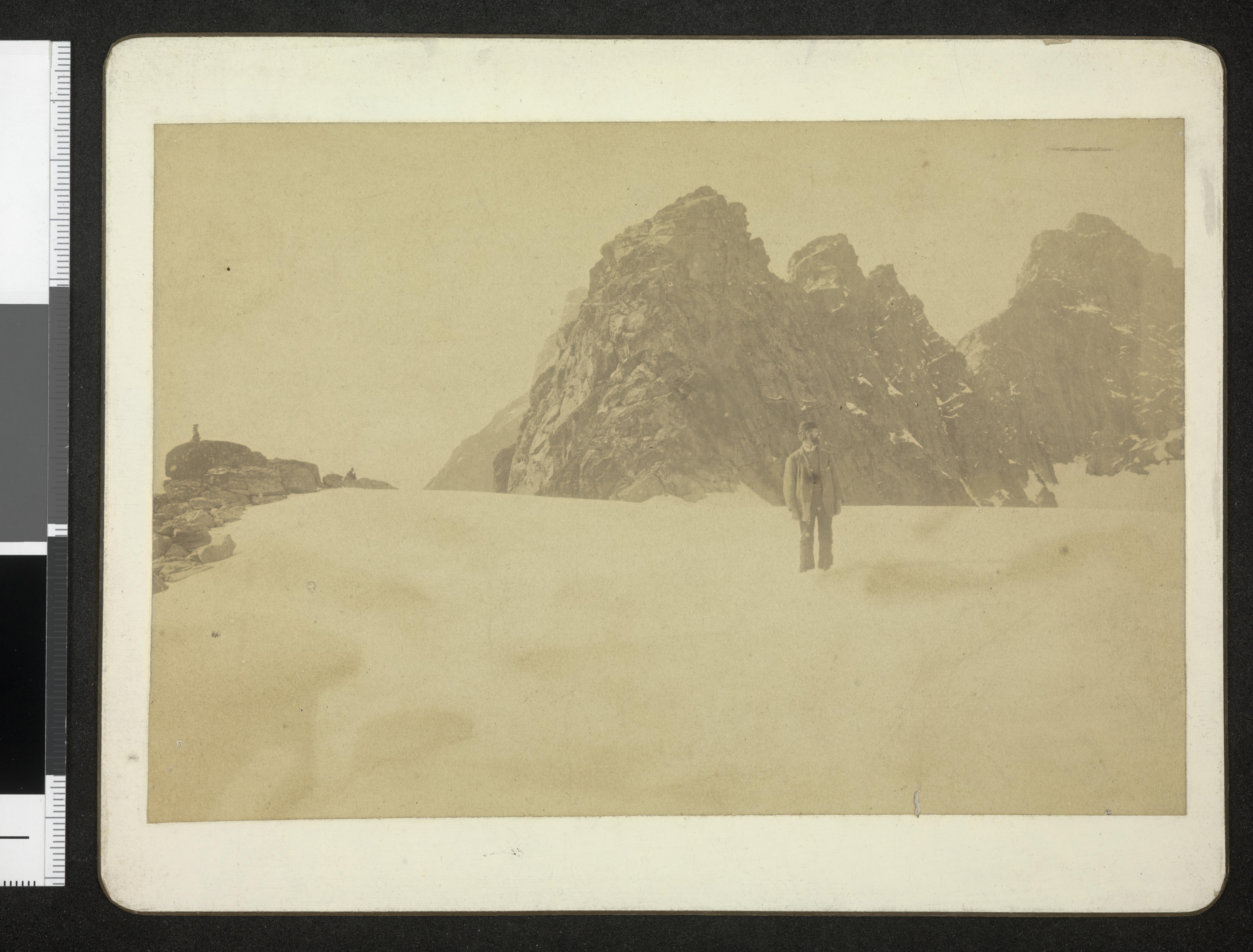 Bildet er hentet fra Nasjonalbibliotekets bildesamling. Anmerkninger til bildet var: Tittel hentet fra bildets baksidetekst Maradalstindane, Luster, Sogn og Fjordane Depicted person: Soggemoen, Mathias